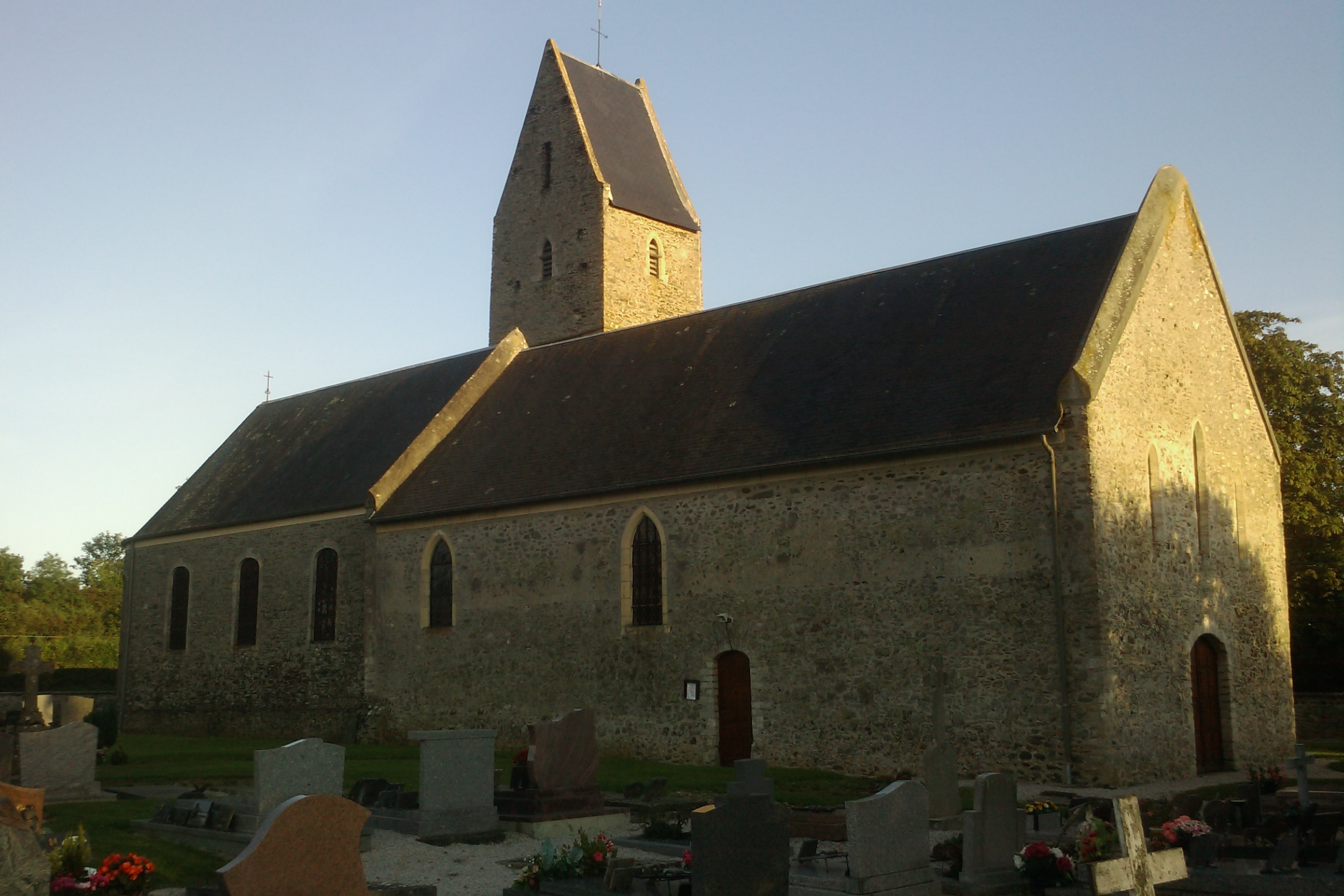 Église Notre-Dame de Rampan